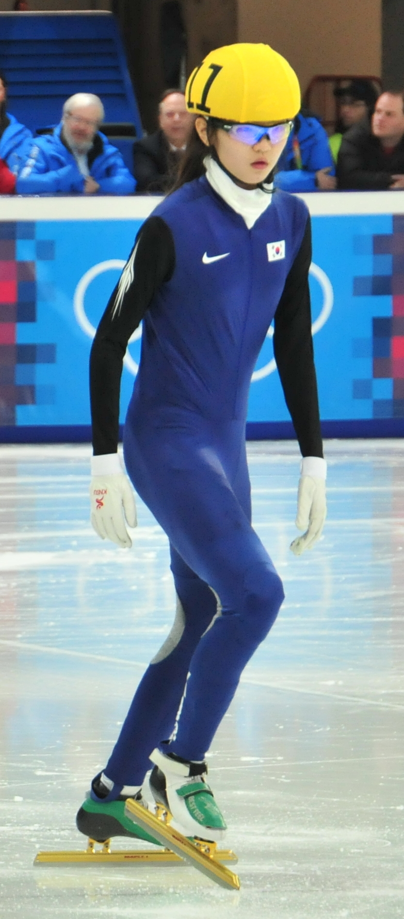 1. Jugendolympiade 2012 Innsbruck. Suk Hee Shim (Korea). Teilnehmerin am Short Track Speed Skating Wettbewerb Erste Olympische Jugend- Winterspiele 201213. bis 22. Jänner in Innsbruck Dieses Foto wurde durch die Unterstützung von Wikimedia Österreich und die Twoonix Software GmbH ermöglicht.